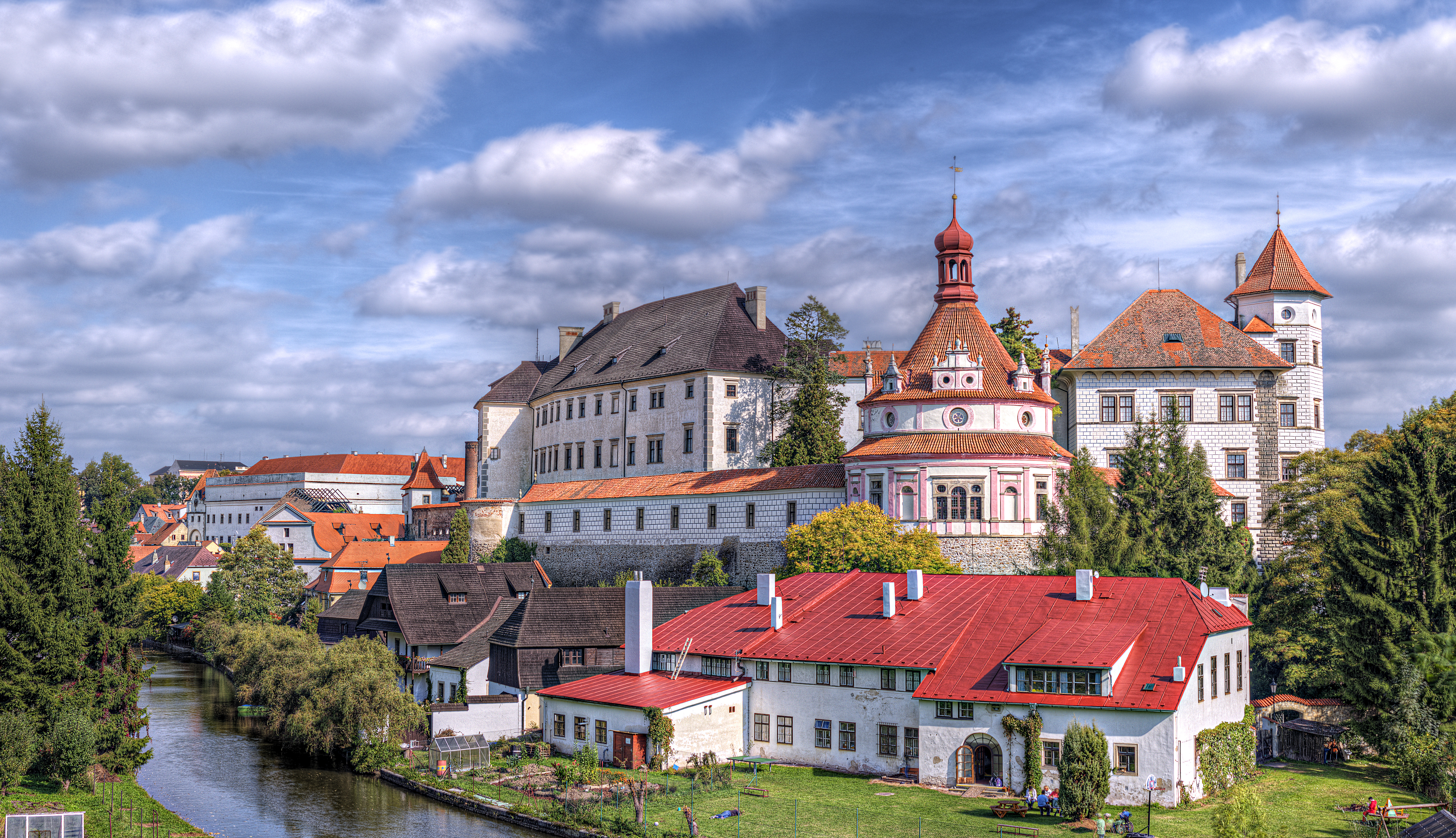 377 01 Jindrichuv Hradec, Czech Republic